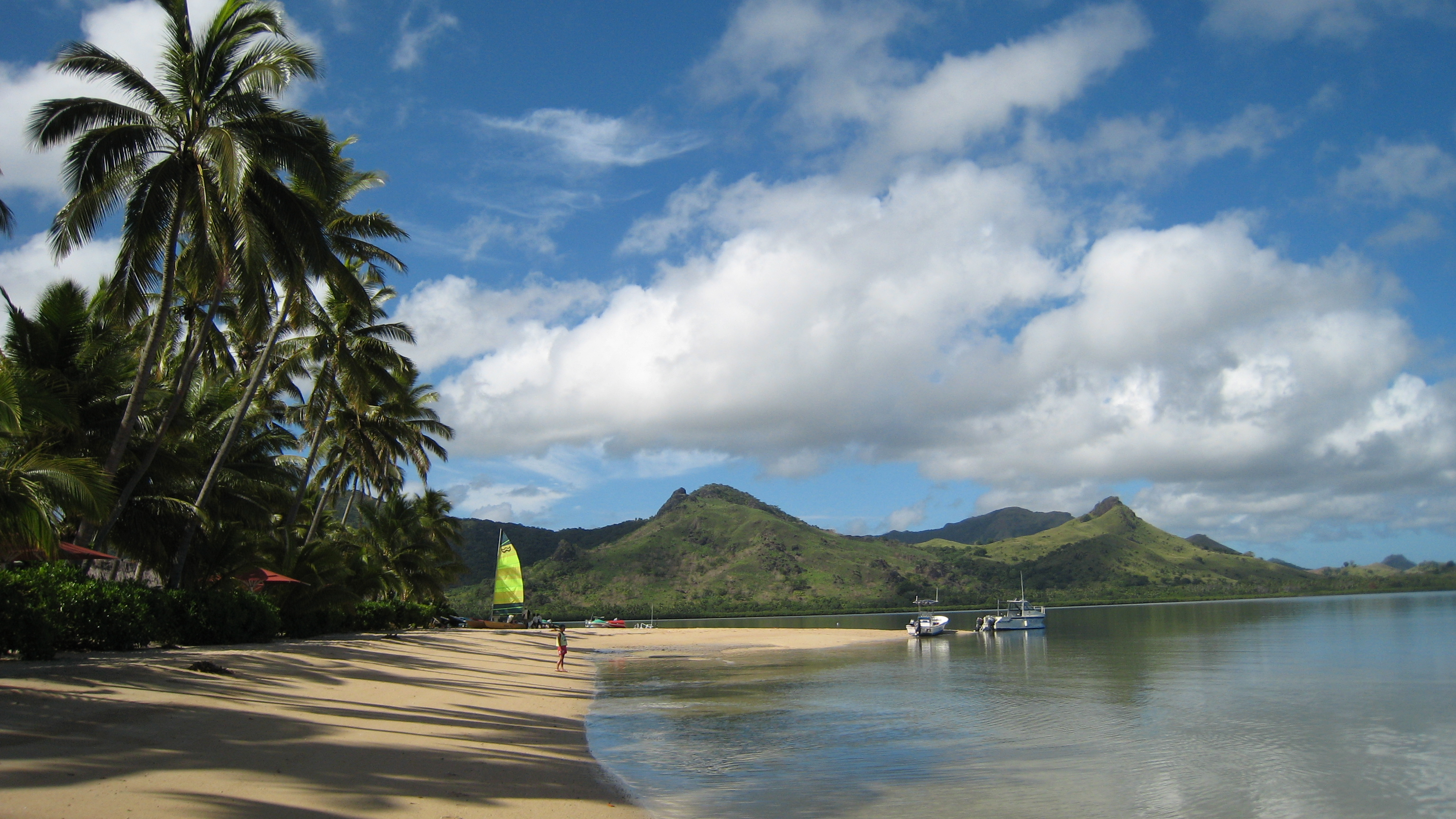 Nukubati Island, Fiji